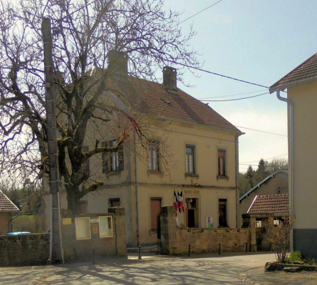 La mairie de Fontenois-la-Ville